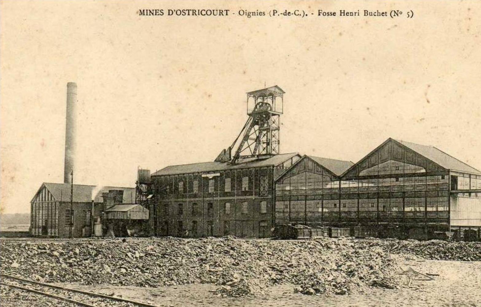 La Fosse n° 5 dite Henri Buchet de la Compagnie des mines d'Ostricourt était un charbonnage constitué d'un seul puits situé à Libercourt, Pas-de-Calais, Nord-Pas-de-Calais, France.